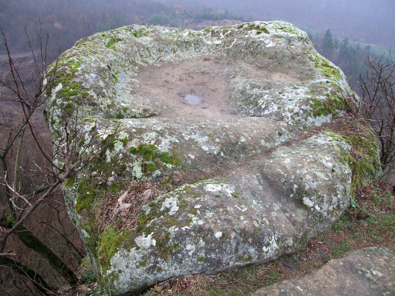 H6b, Sirok, Törökasztal